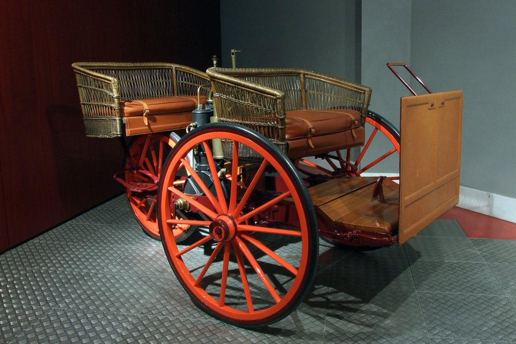 Bonet, 1889 Museo de Historia de la Automoción de Salamanca Native nameMuseo de Historia de la Automoción (Salamanca)LocationSalamanca, (Spain)Coordinates40° 57′ 29.73″ N, 5° 40′ 00.95″ W Established2002Web page control : Q6034050 institution QS:P195,Q6034050